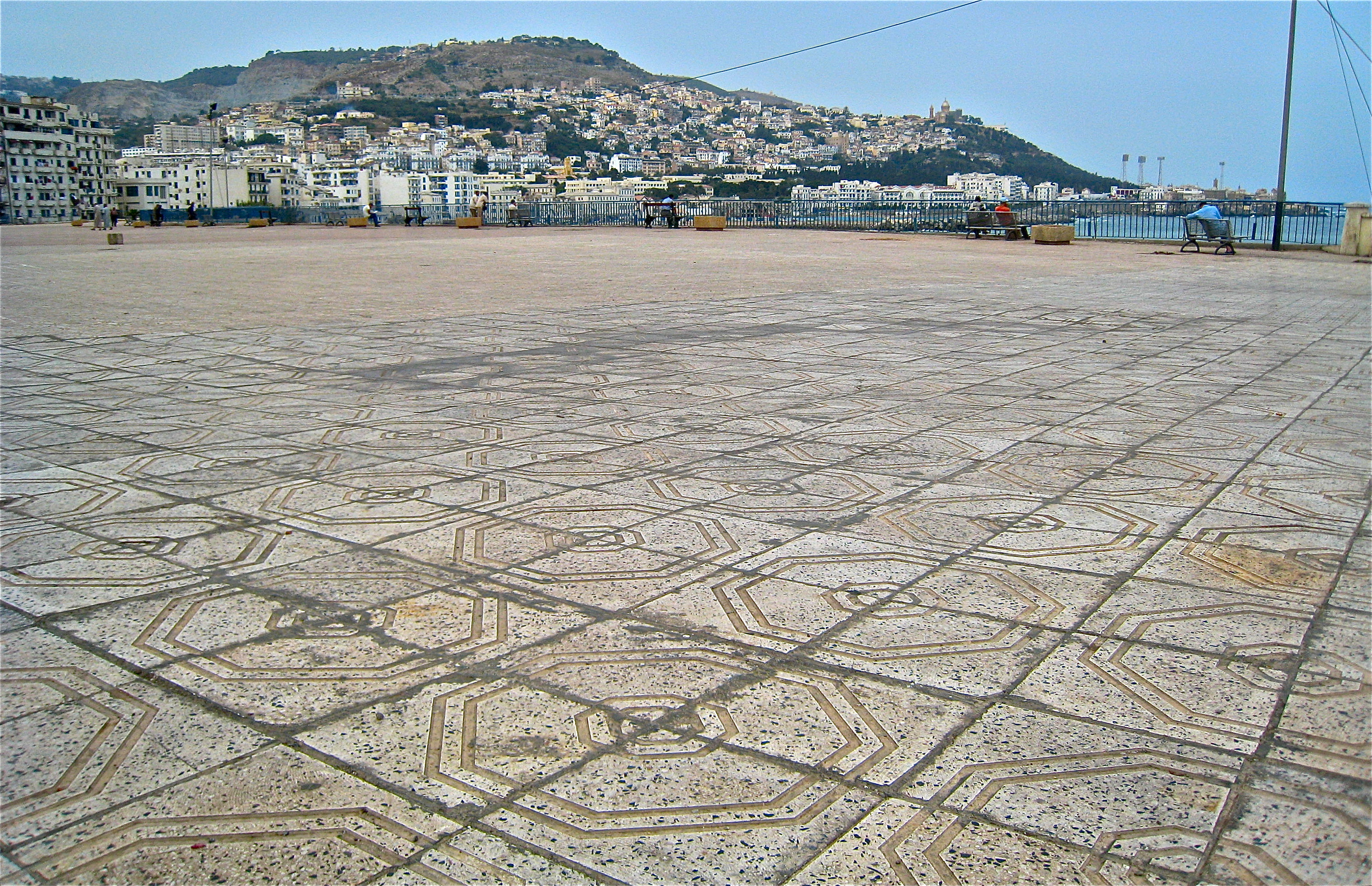 Grand place en bord de mer devant Bab-El-Oued